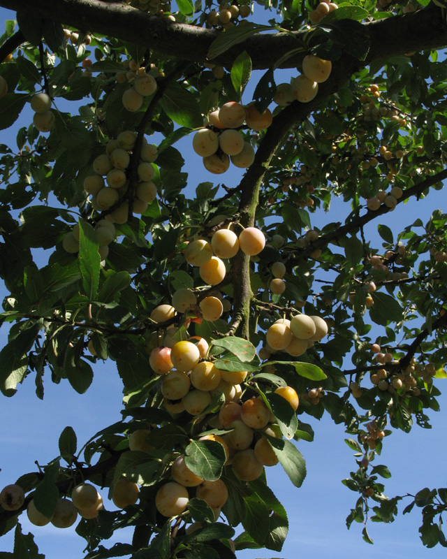 Mirabelle tree